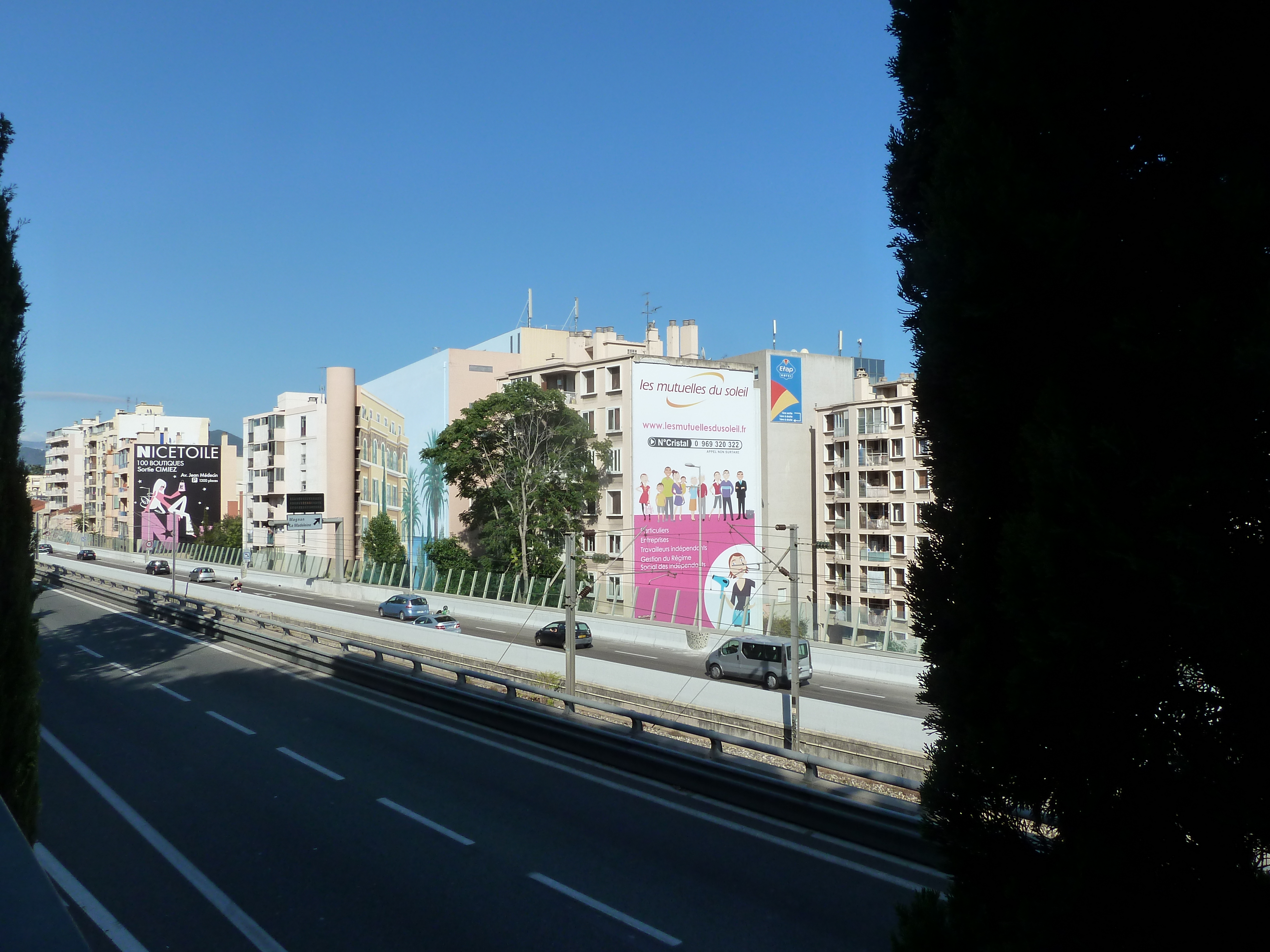 Voie Mathis à Nice entre la sortie Magnan et Fabron